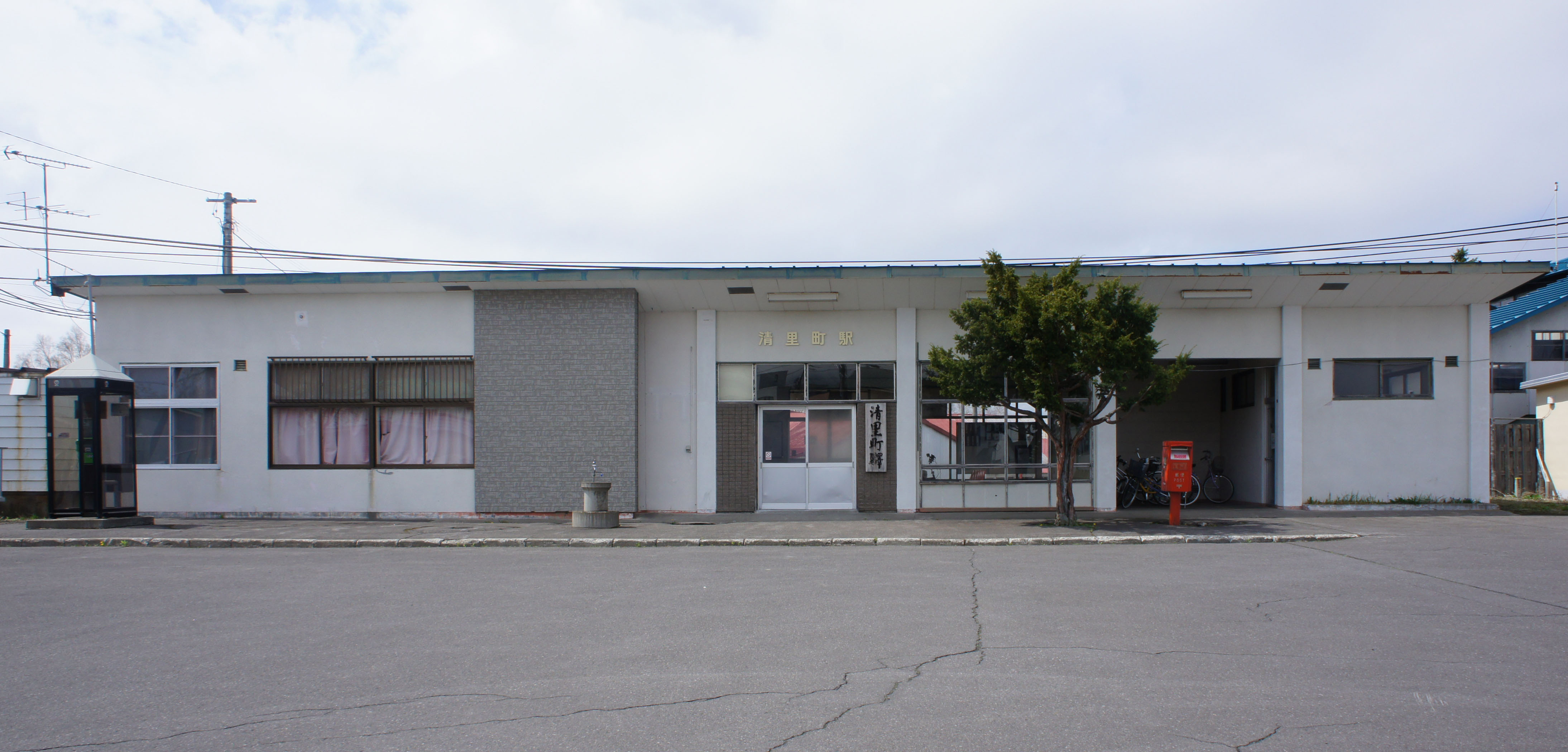 JR釧網本線・清里町駅の駅舎